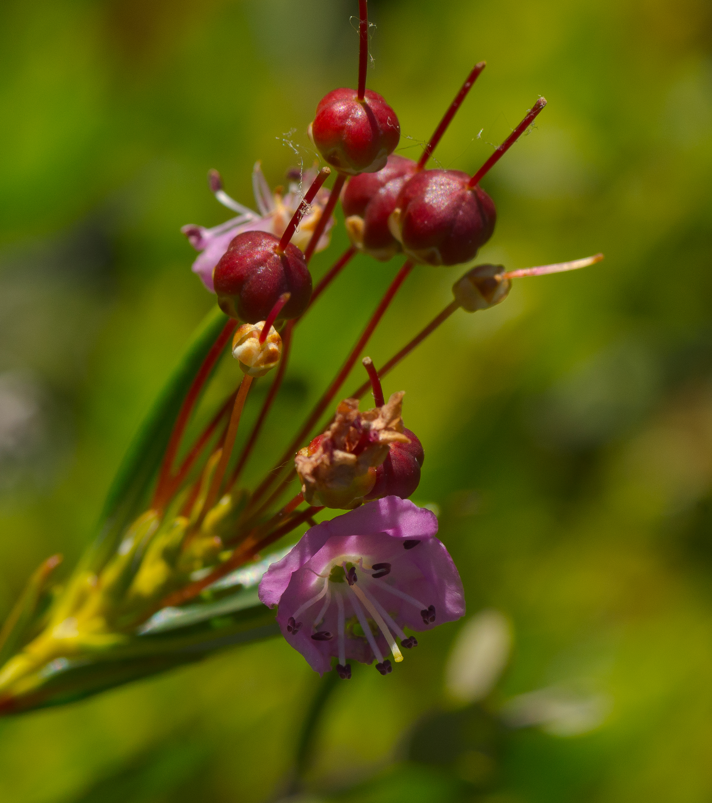 Bog laurel, Kalmia polifolia